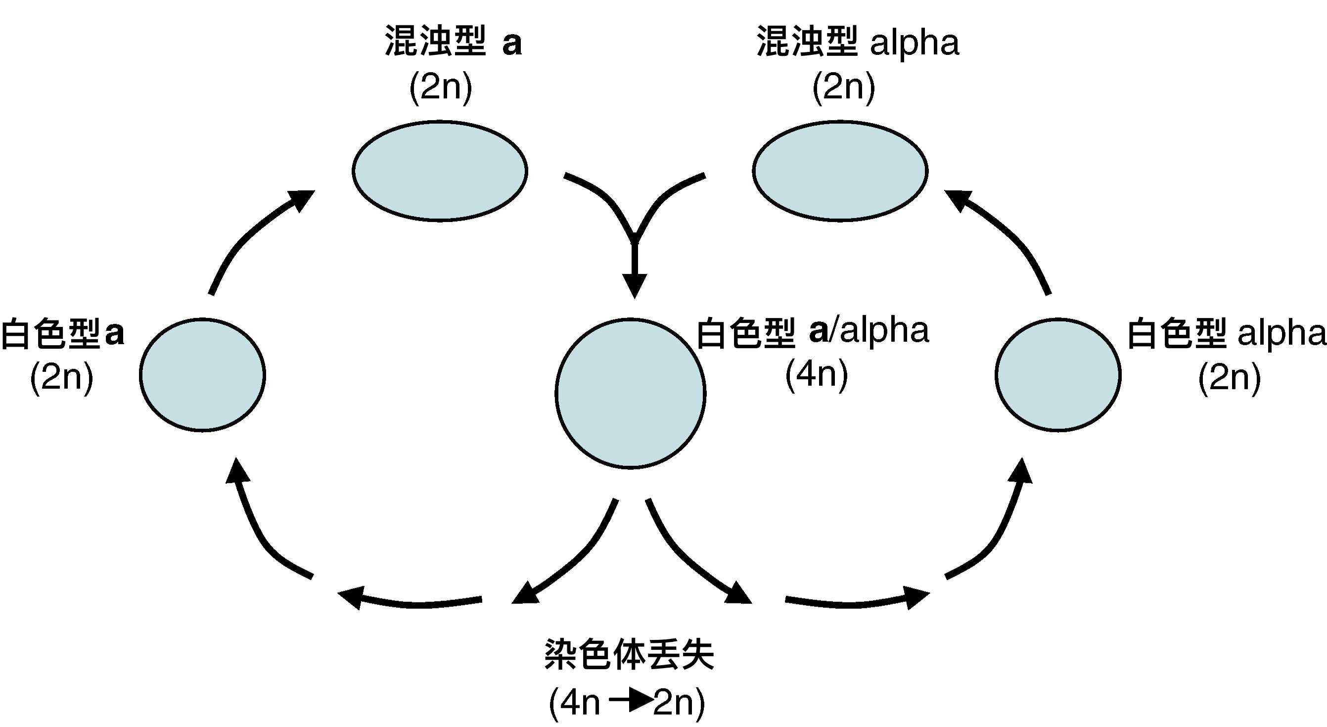 白色念珠菌的准性生殖过程